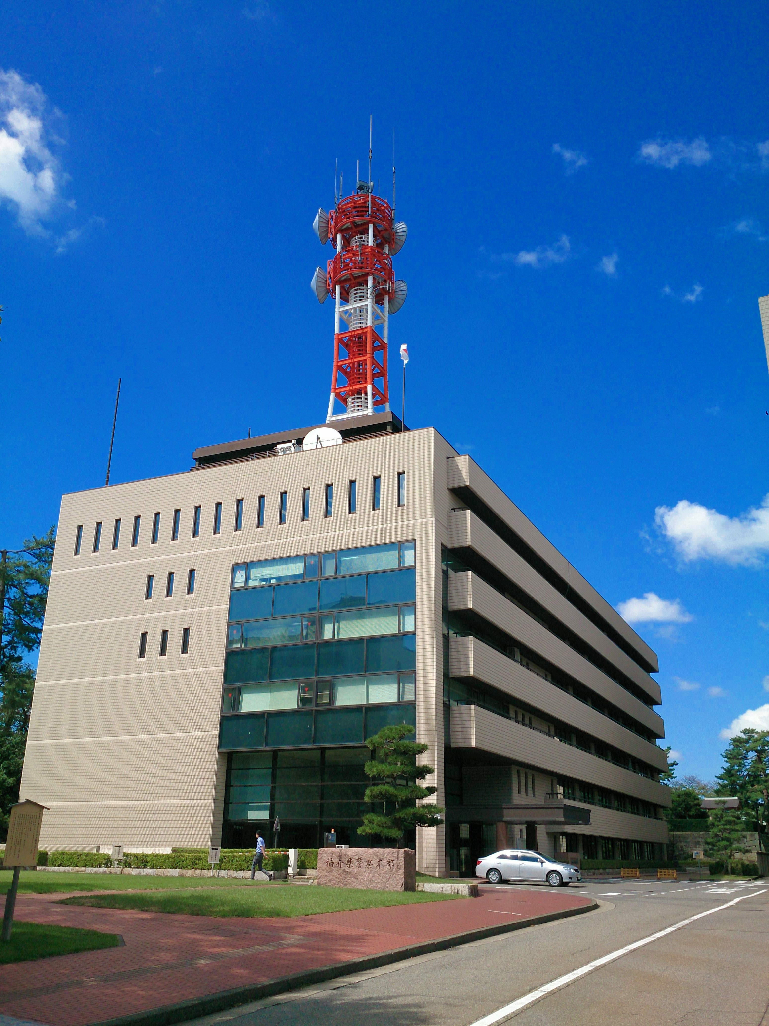 福井県警察本部